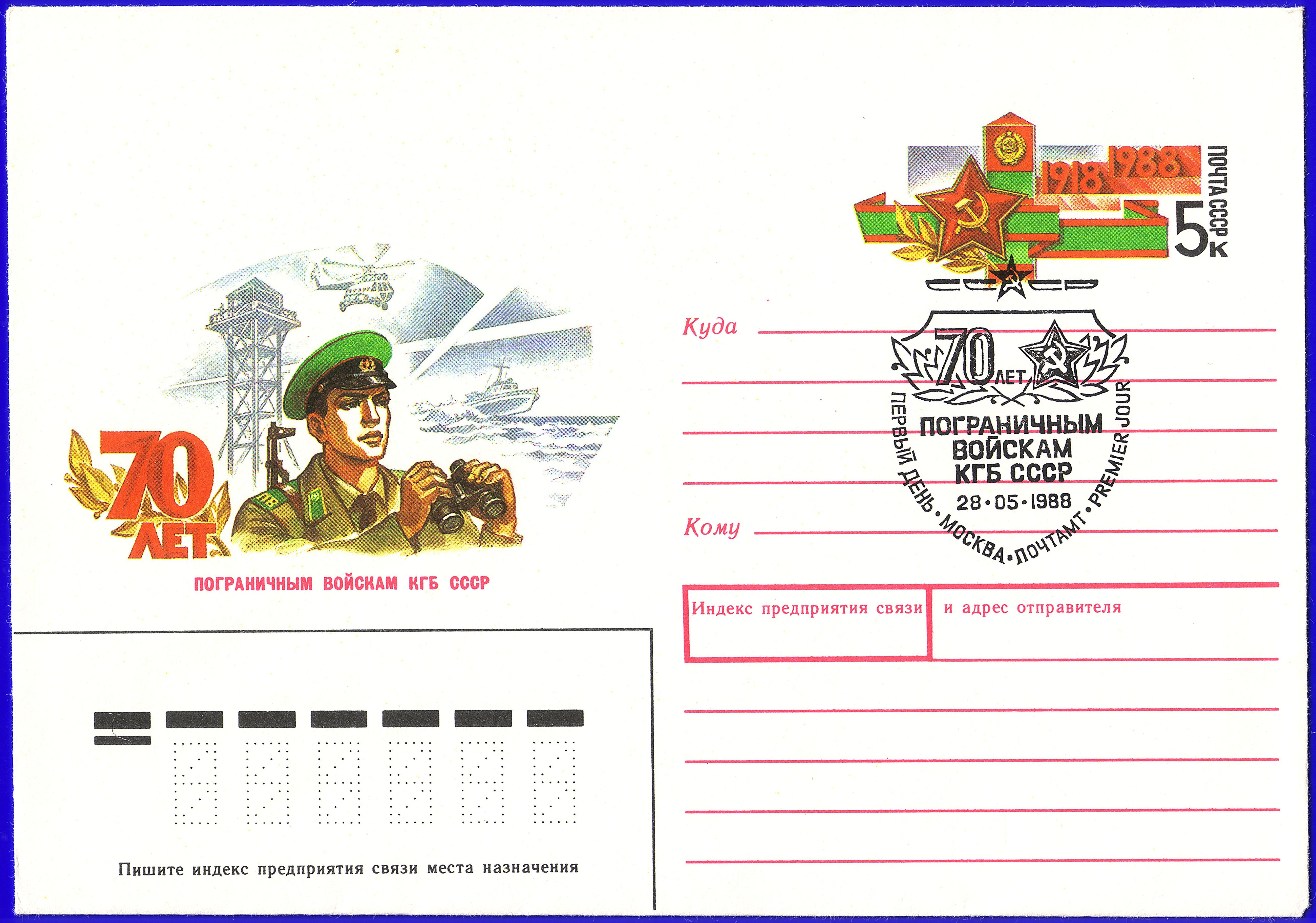 USSR original stamp 1988: KGB 70 Anniversary 70 лет пограничным войскам КГБ СССР. Почтовый конверт СССР с оригинальной маркой и гашением первого дня на Главпочтамте Москвы в День пограничника, 28 мая 1988. Дата подписания в печать - 18 февраля 1988. Тираж не указан.